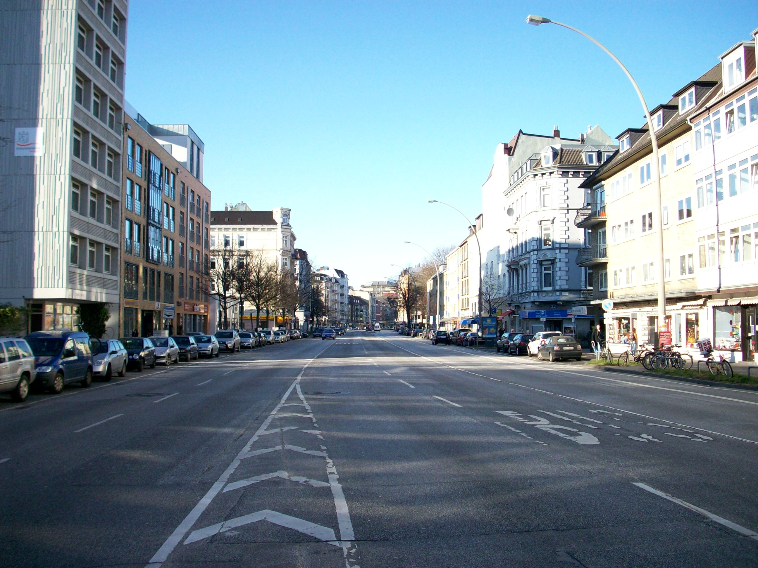 Die Grindelallee in Hamburg-Rotherbaum, Blick stadtauswärts/Nord-West.